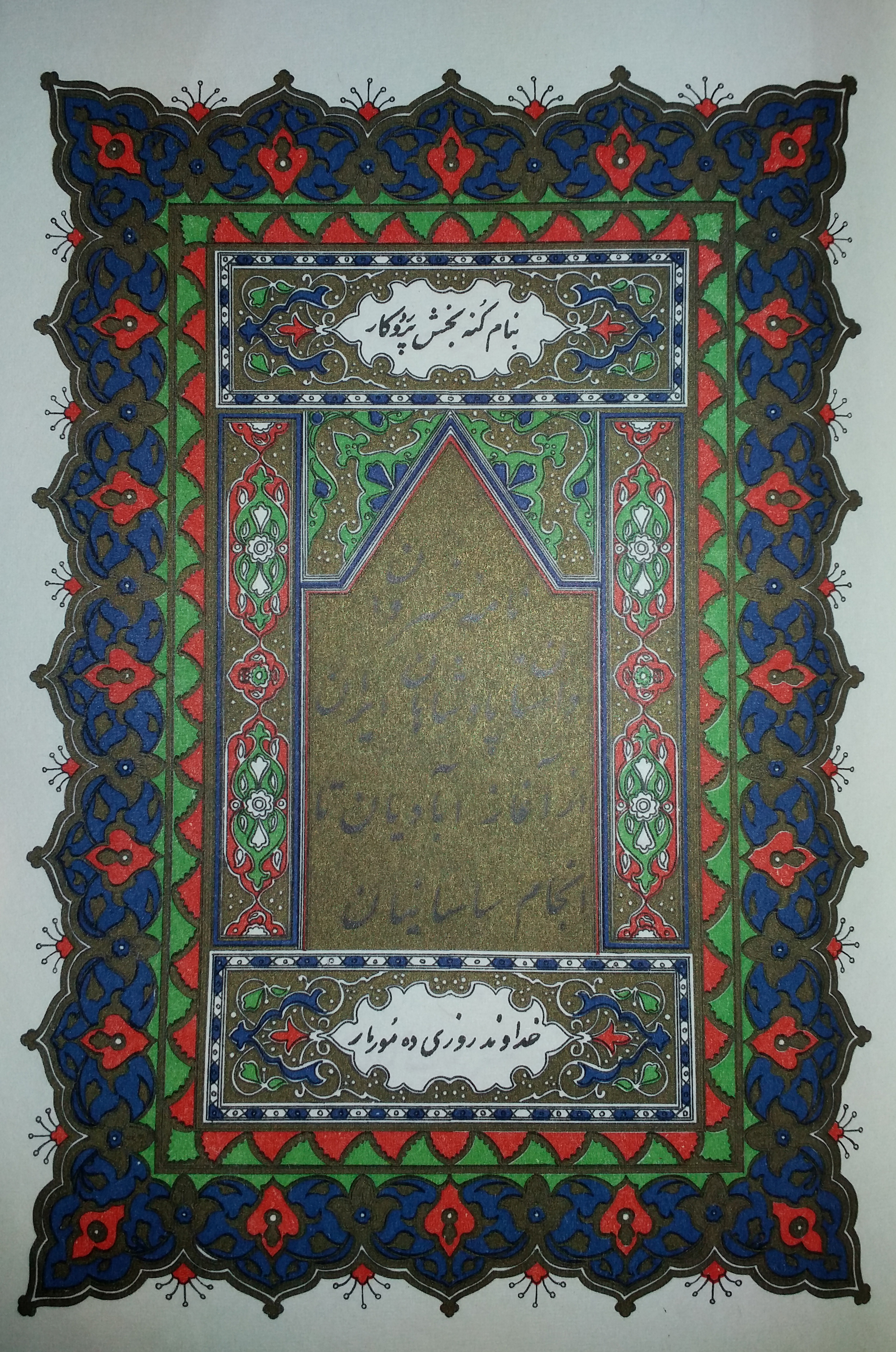 صفحهٔ نخست کتاب نامهٔ خسروان اثر جلال‌الدین میرزا قاجار